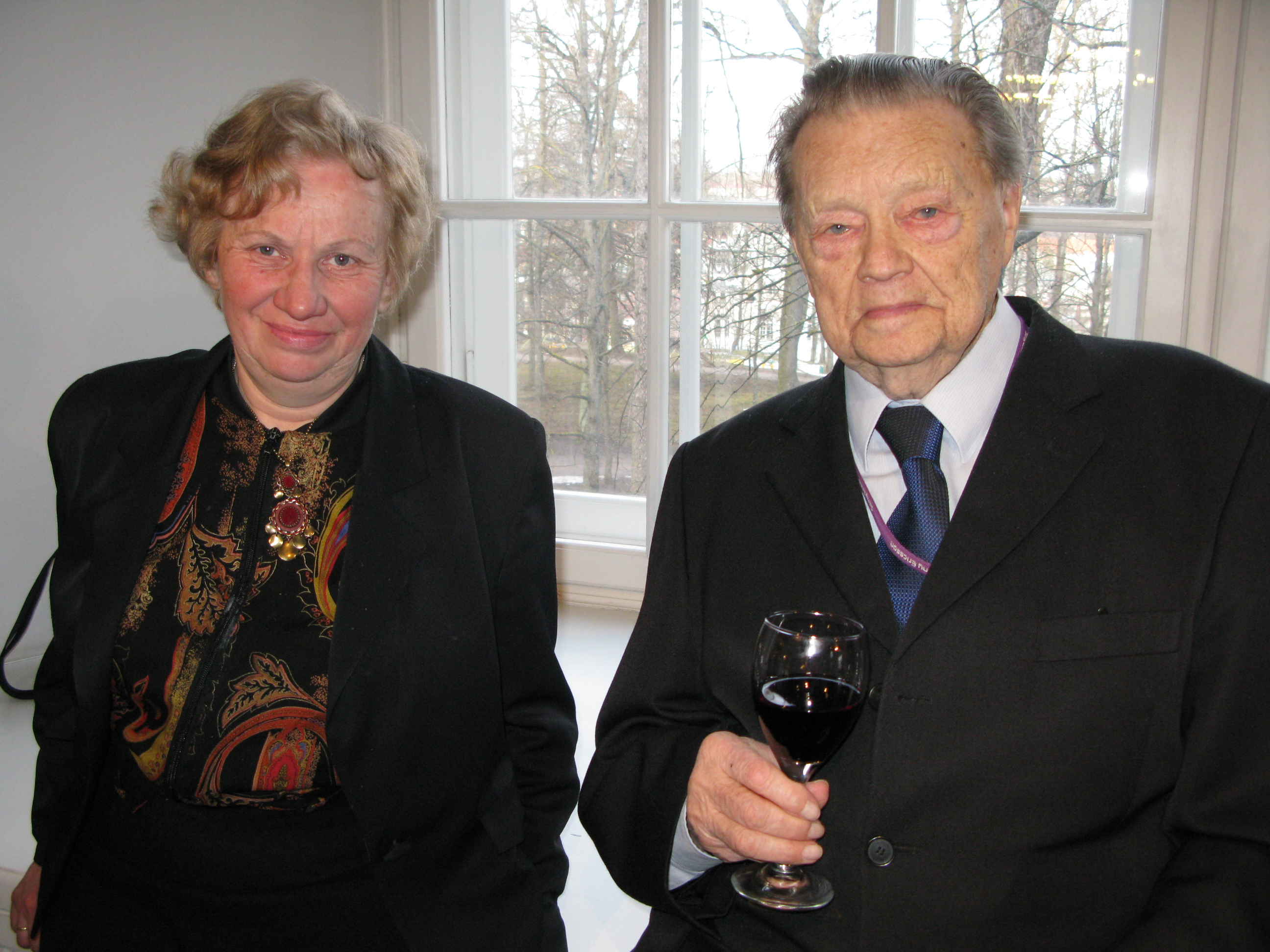 Kunstiteadlane Krista Piirimäe ja keemik ning ajaloolane Tullio Ilomets